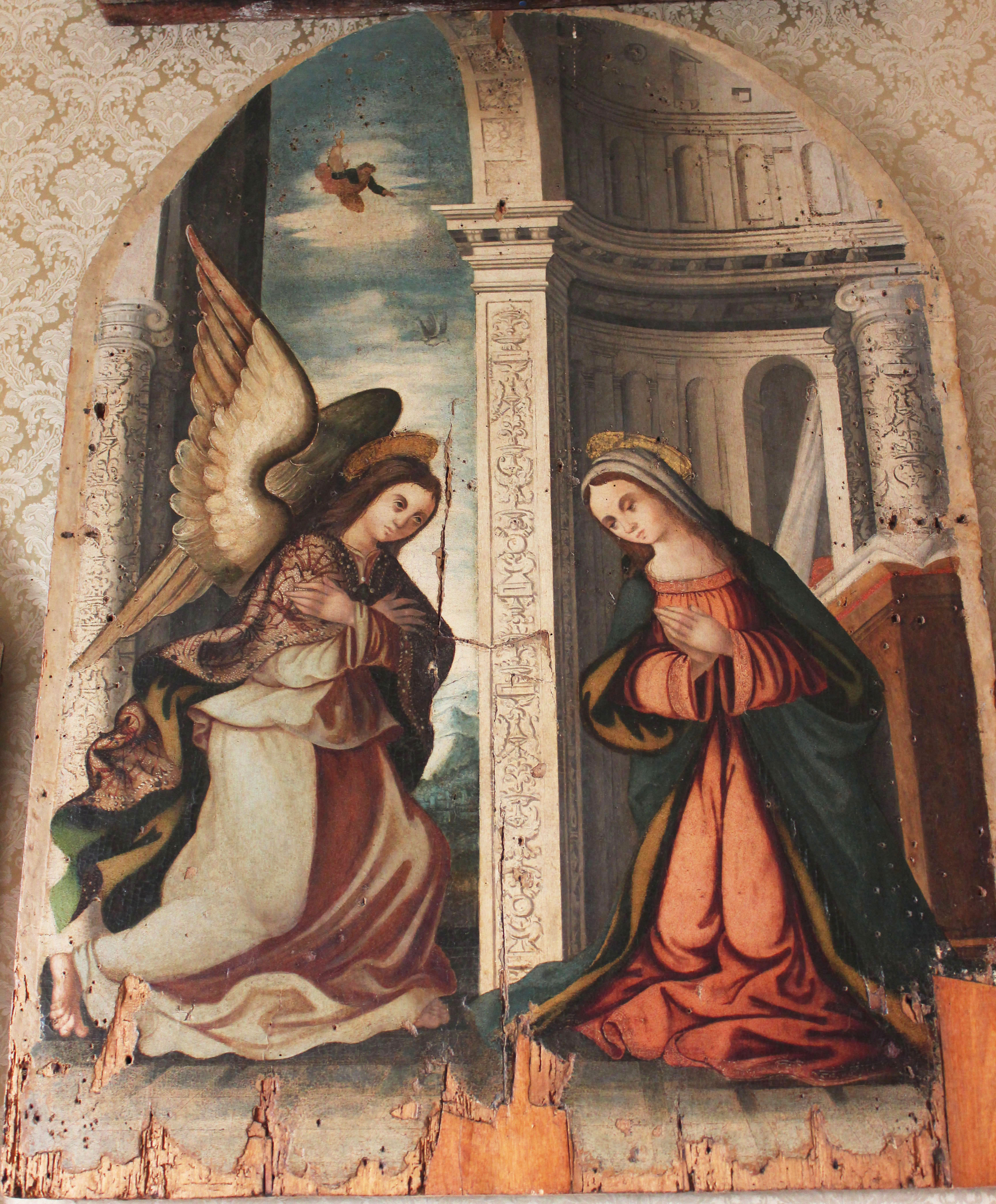 Dipinto Annunciazione, palazzo vescovile